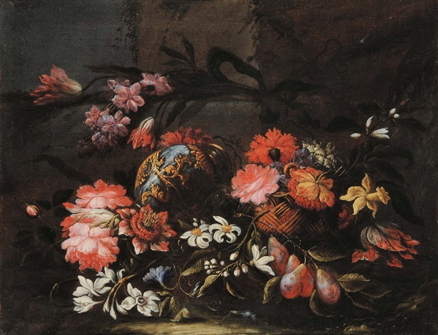 Artist: Domenico Bettini (Italian, 1644–1705) Title: Natura morta con fiori e frutta Medium: oil on canvas Size: 39 x 50 cm. (15.4 x 19.7 in.)